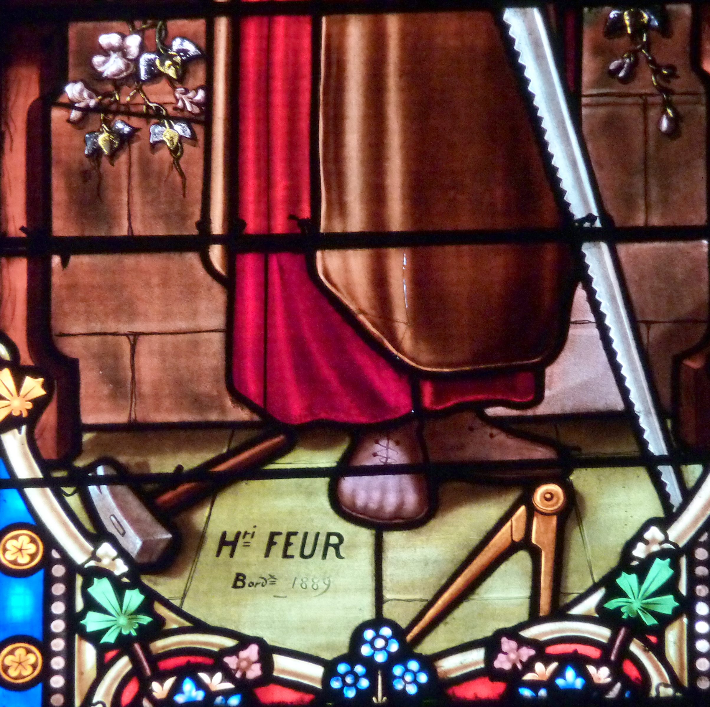 Bleiglasfenster in der Kirche Sainte-Eulalie in Bordeaux, Darstellung: Ausschnitt mit Signatur Henri Feur Bordeaux 1889